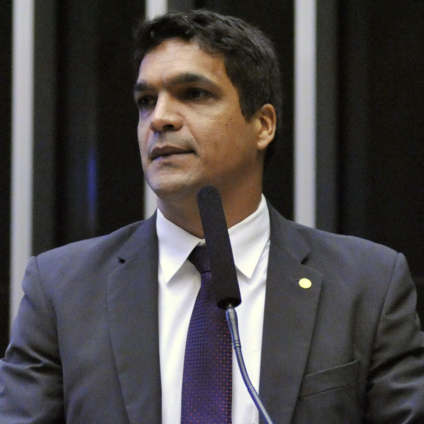 Cabo Daciolo em maio de 2017.